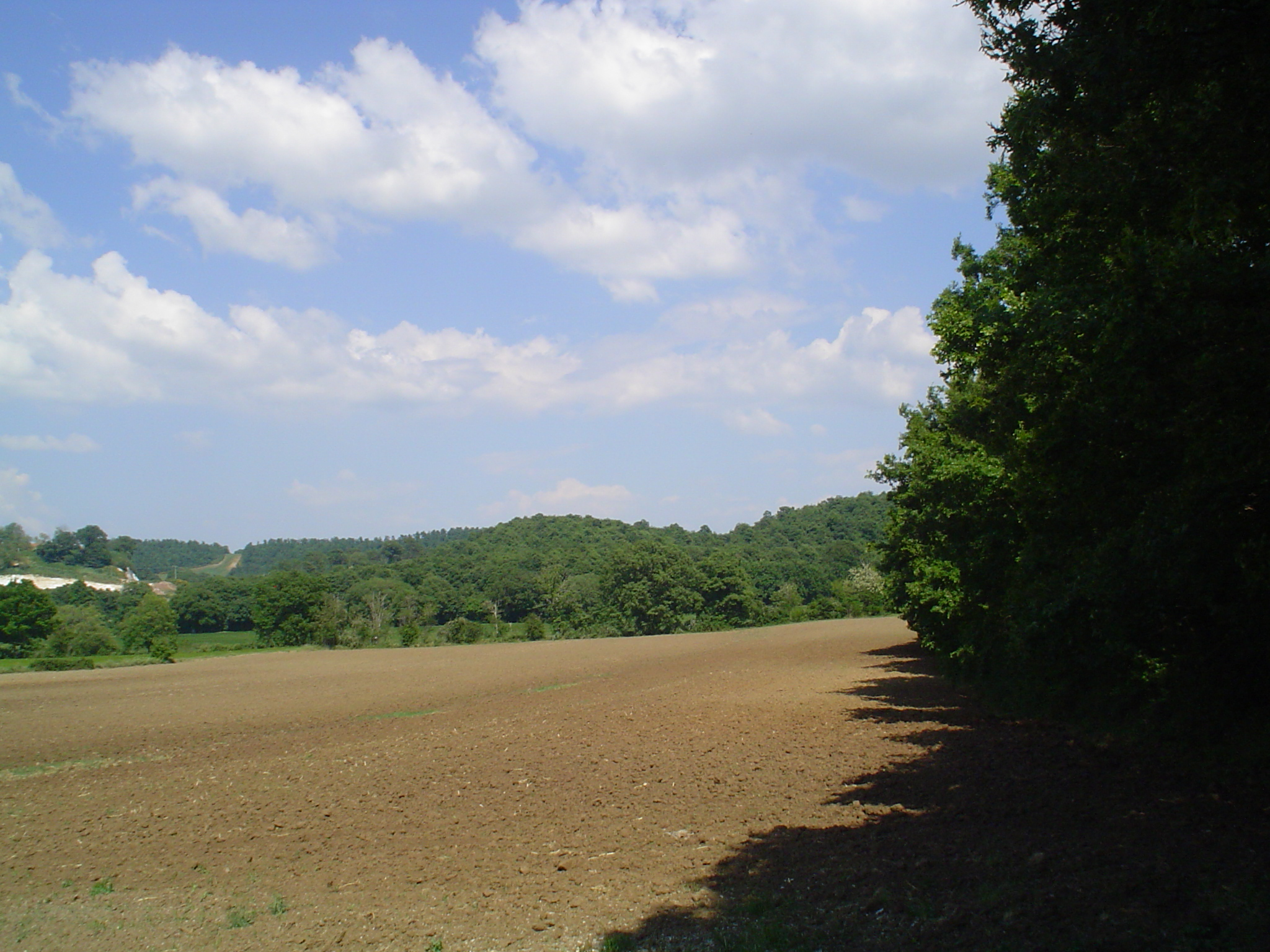 campo in mezzo al bosco